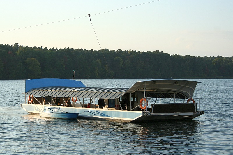 Fähre der Strausberger Eisenbahn auf dem Straussee